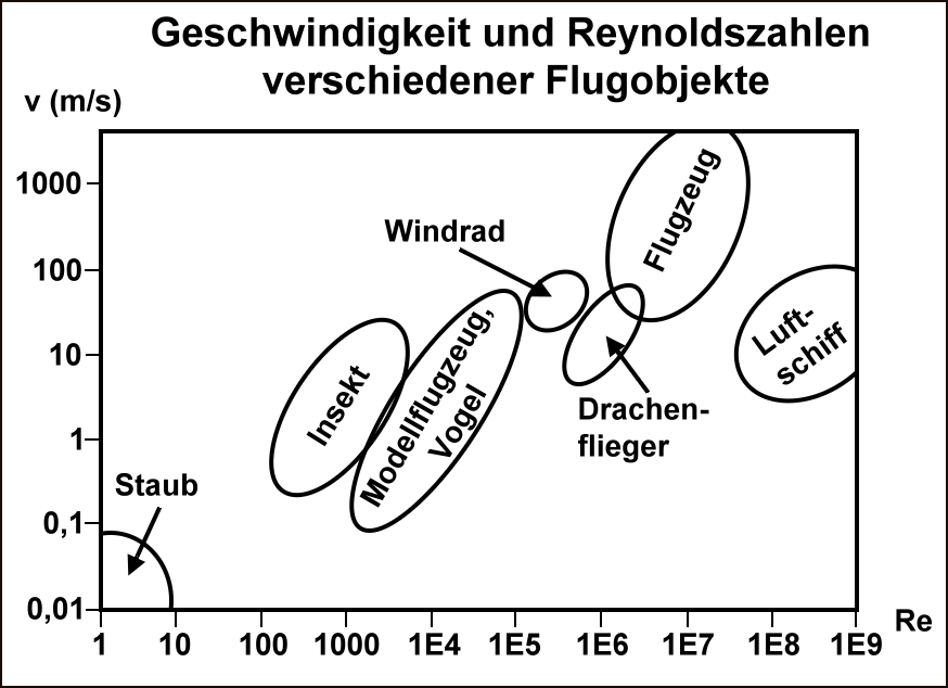 Reynoldszahlen und Geschwindigkeiten verschiedener Flugobjekte